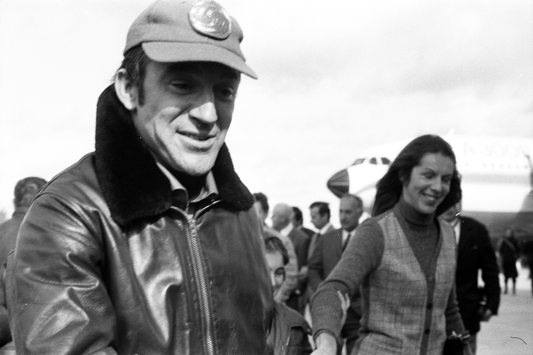 Pistes de Blagnac. 28 octobre 1972. Plan taille de 3/4 face de Bernard Ziegler (un des pilotes de l'équipage du vol d'essai), à côté de lui sa femme et sa fille ; en arrière-plan autres personnes, nez de l'avion. Cliché pris lors du 1er vol d'essai de l'avion Airbus A300 B.